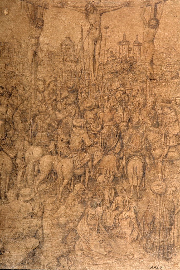 Crucifixion